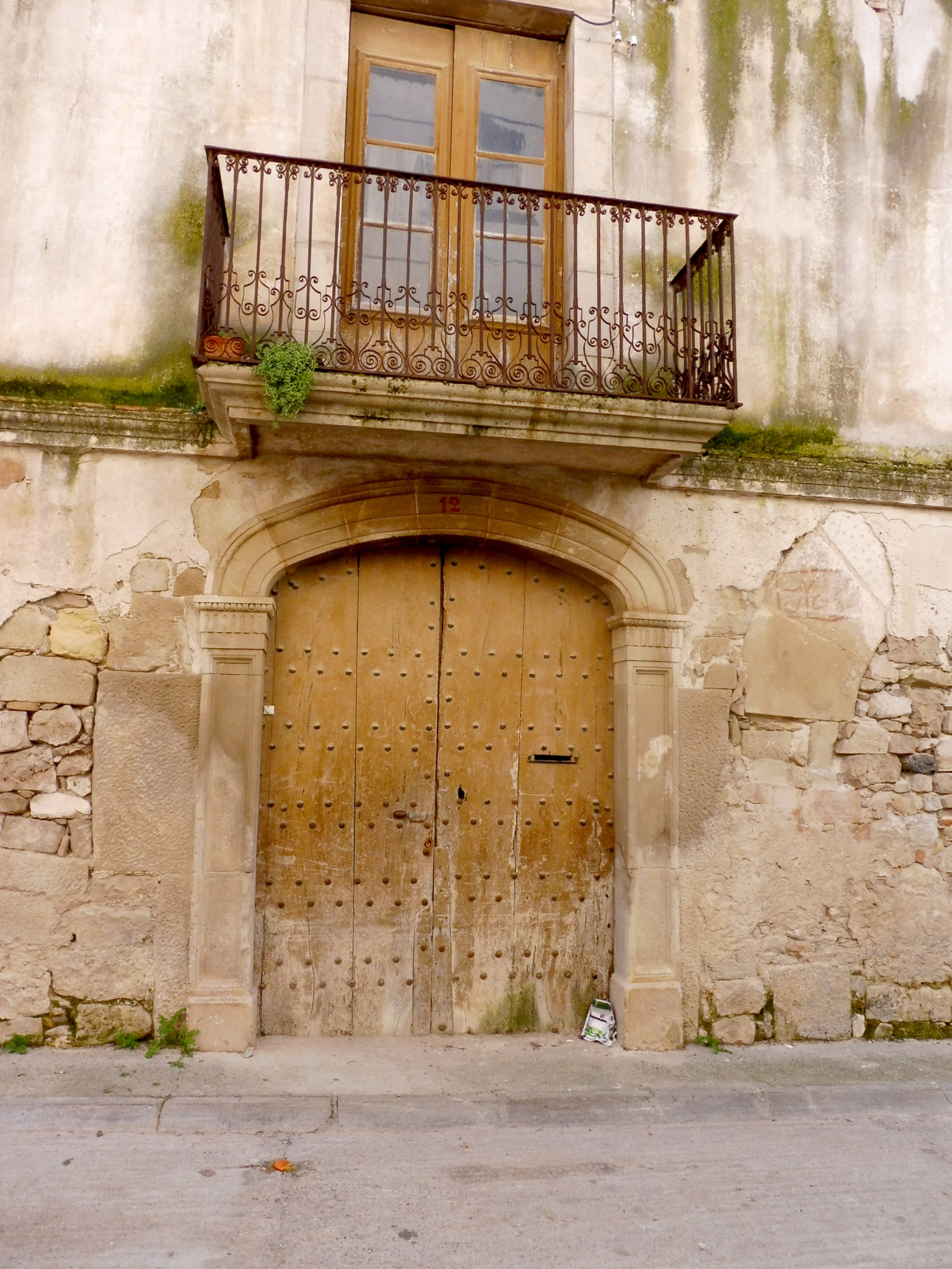 Casa Renyé de Belianes: portada